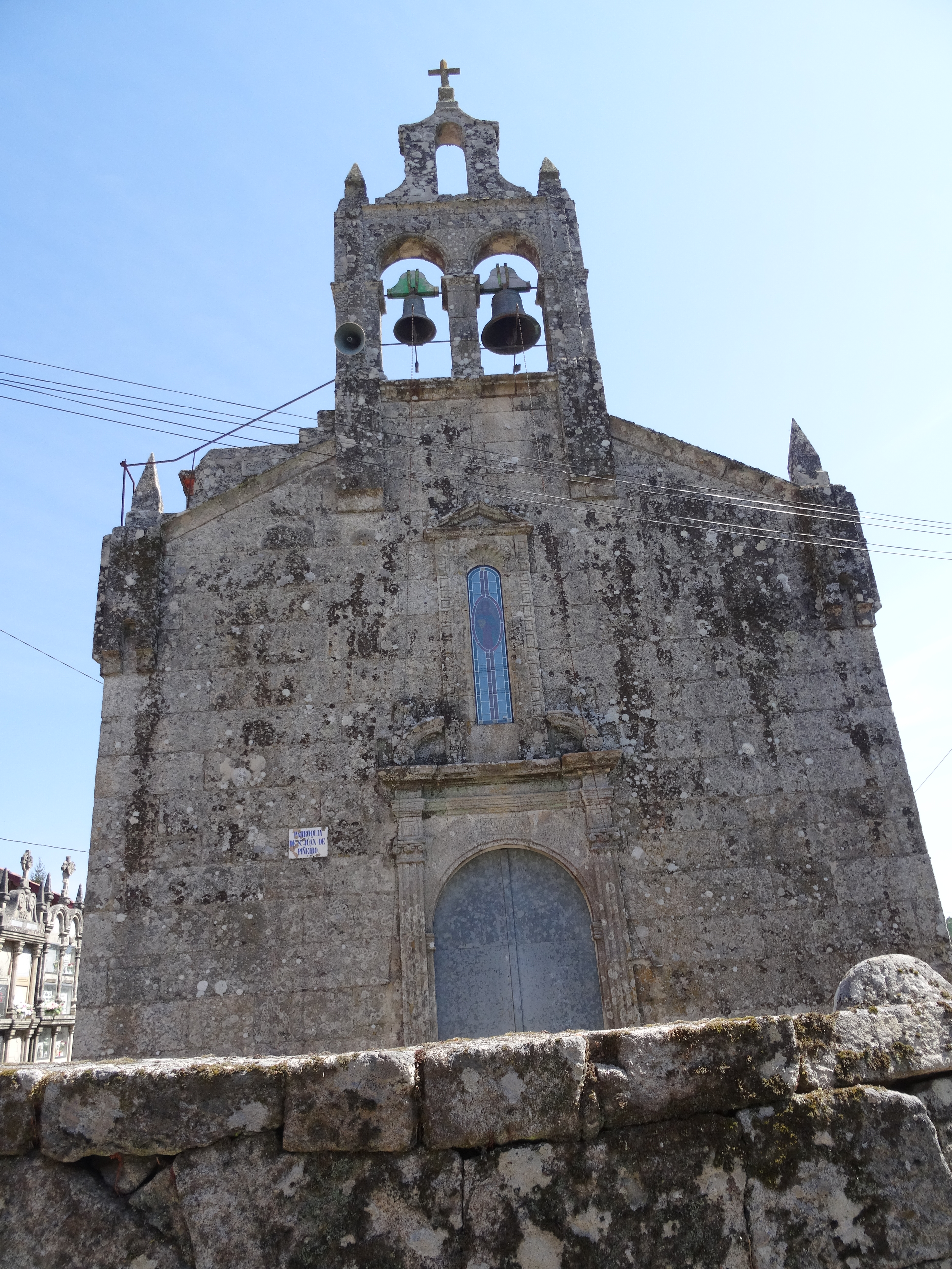 Ver título.